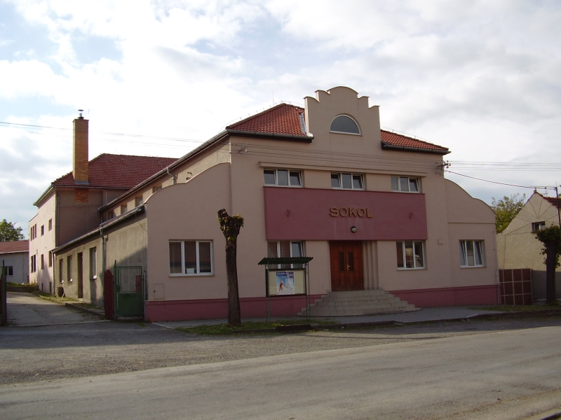 Sokolovna v Přemyslovicích po rekonstrukci čelní fasády.